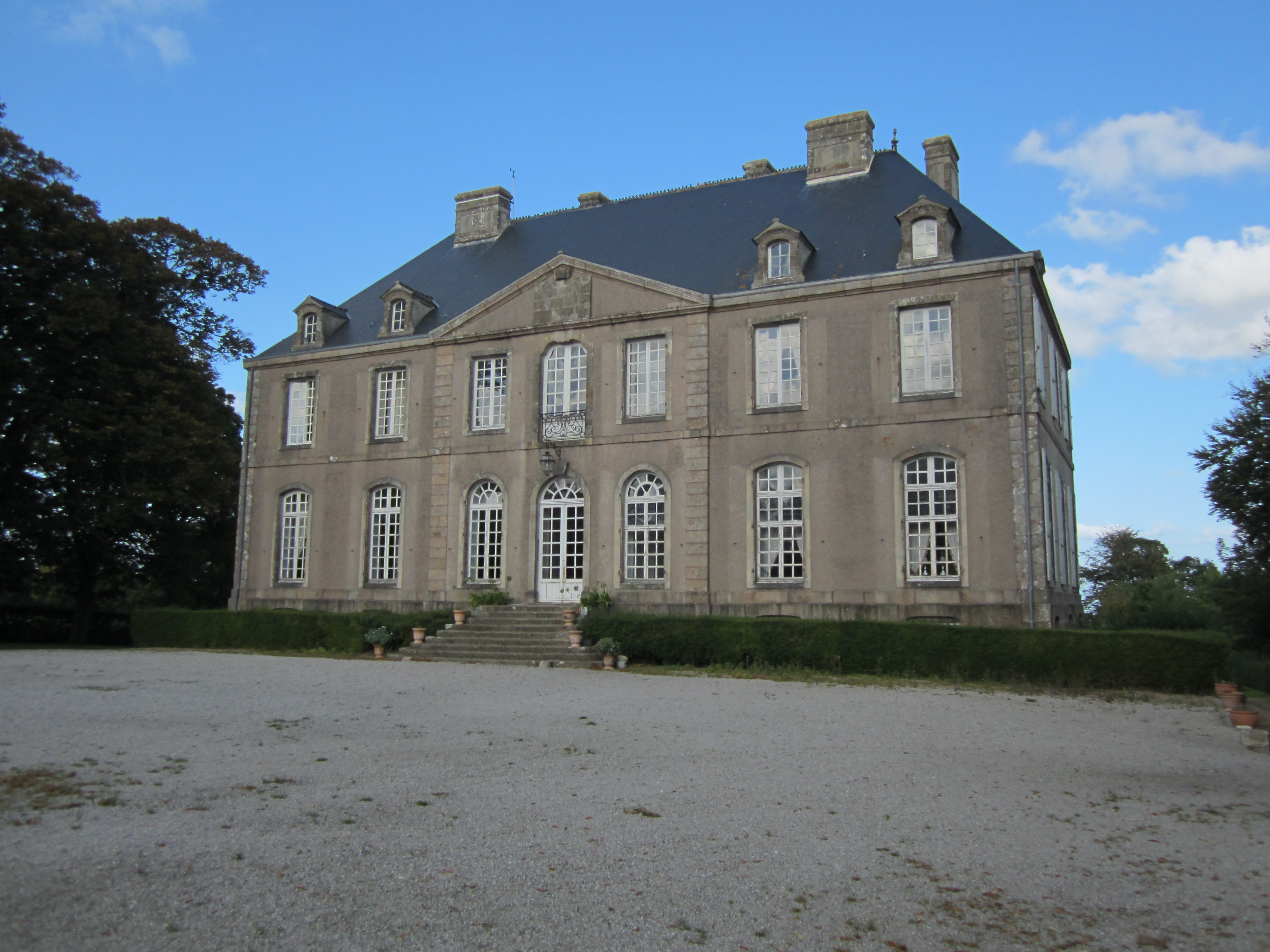 Château de Carneville, Manche Les communs datent du 17e siècle. Le château est du 18e siècle. .